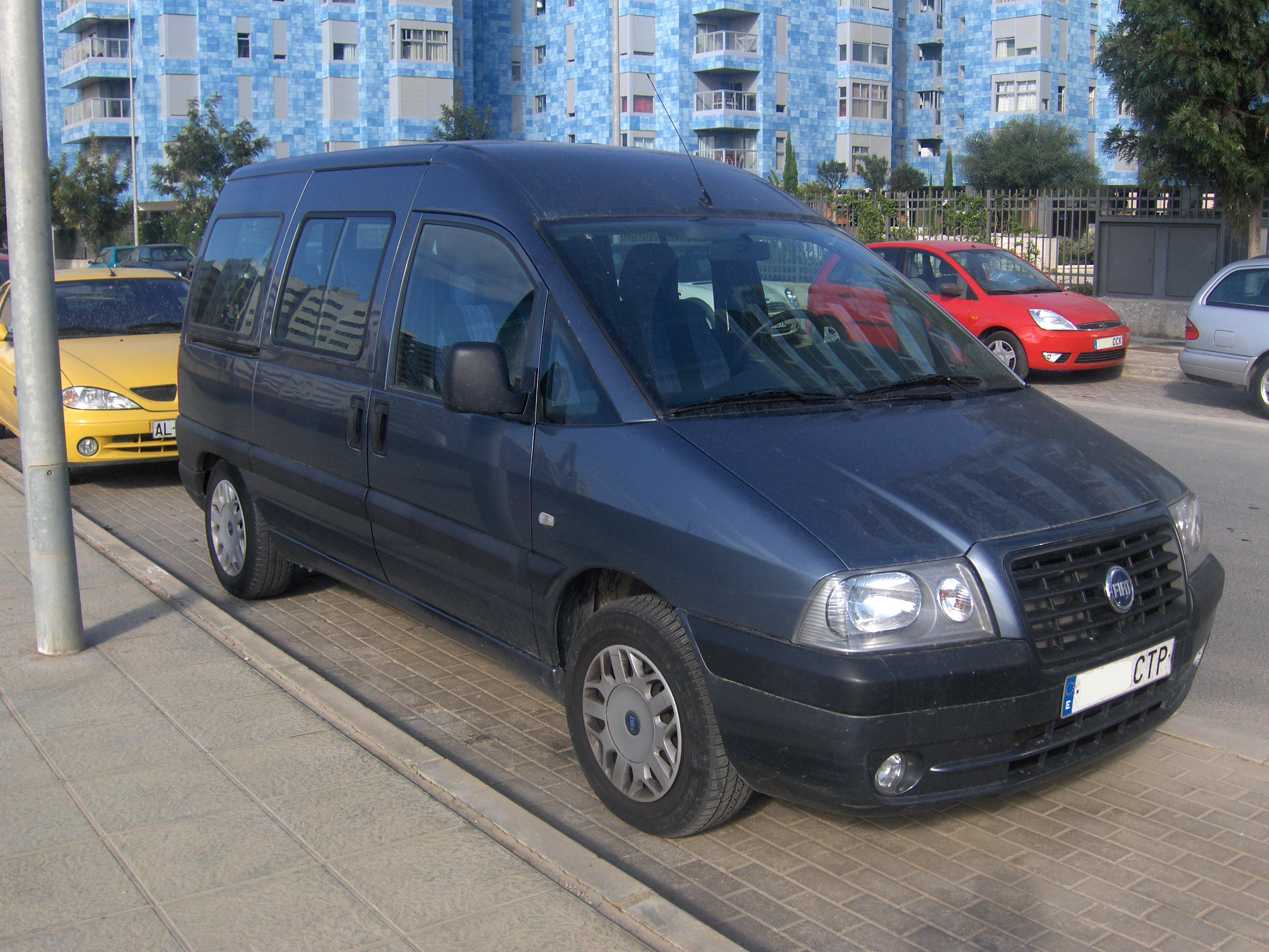 Fiat Scudo de 2004, tras el restyling